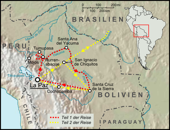 Route und Stationen der vierten Forschungsreise des Percy Fawcett